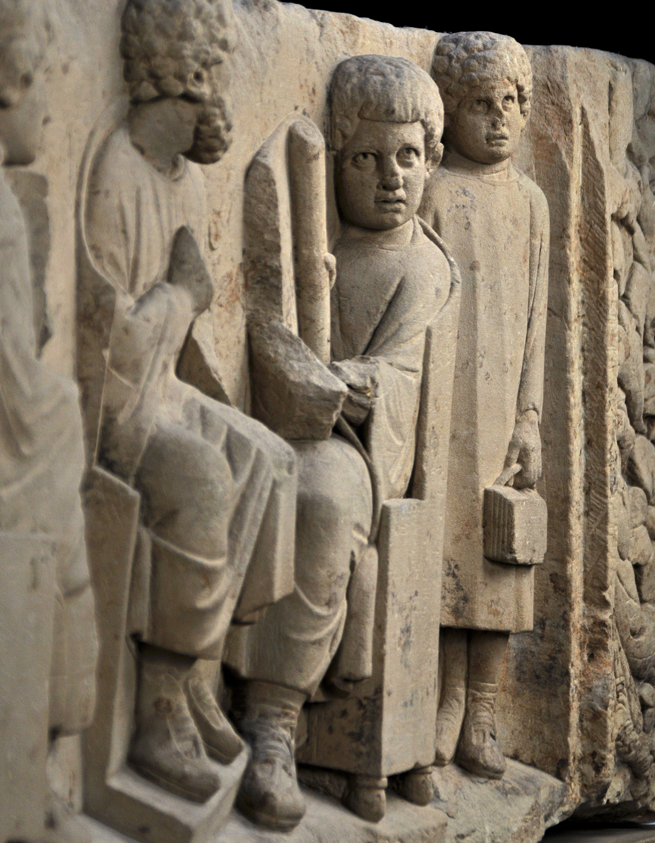 Relief mit Schulszene von einem römischen Grabdenkmal. Um 180 bis 185 nach Christus, Fundort Neumagen